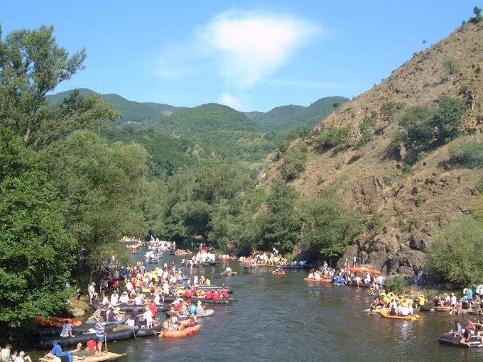 Српски (ћирилица): Весели спуст - Почетна деоница, Маглич